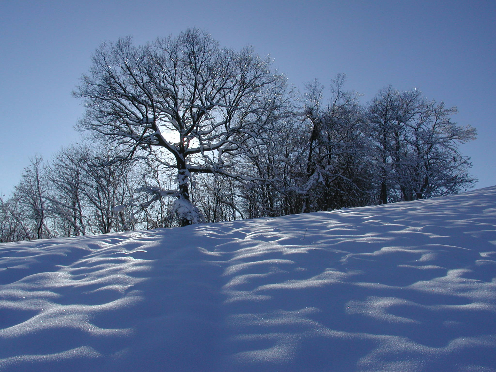 Oak tree with snow, Carpineti, provincia di Reggio Emilia italy author: Paolo Picciati Quercia con neve, appennino reggiano